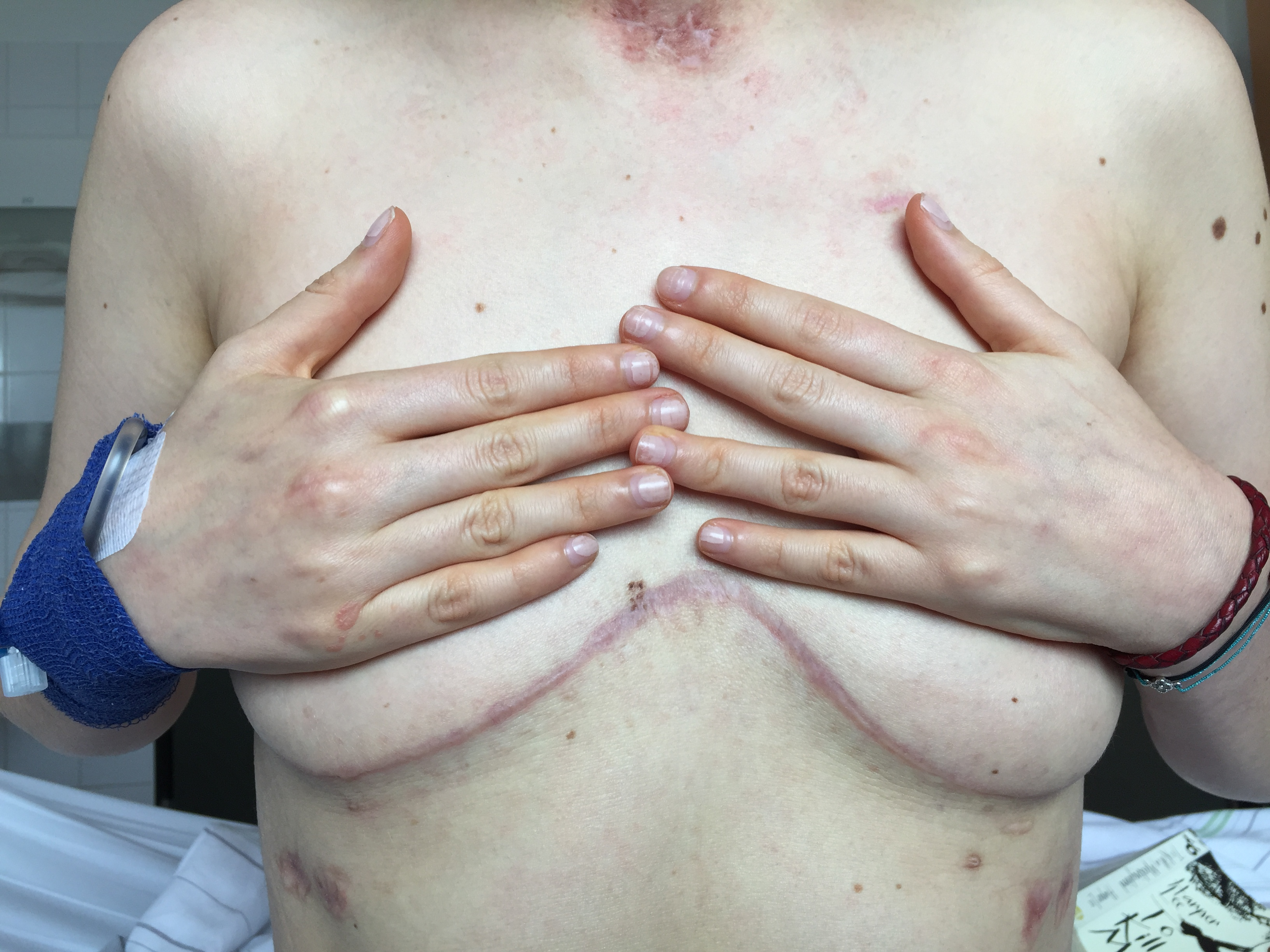 Cicatriz foto frontal cirugia doble trasplante de pulmon enero 11 2020 Salomé Castro